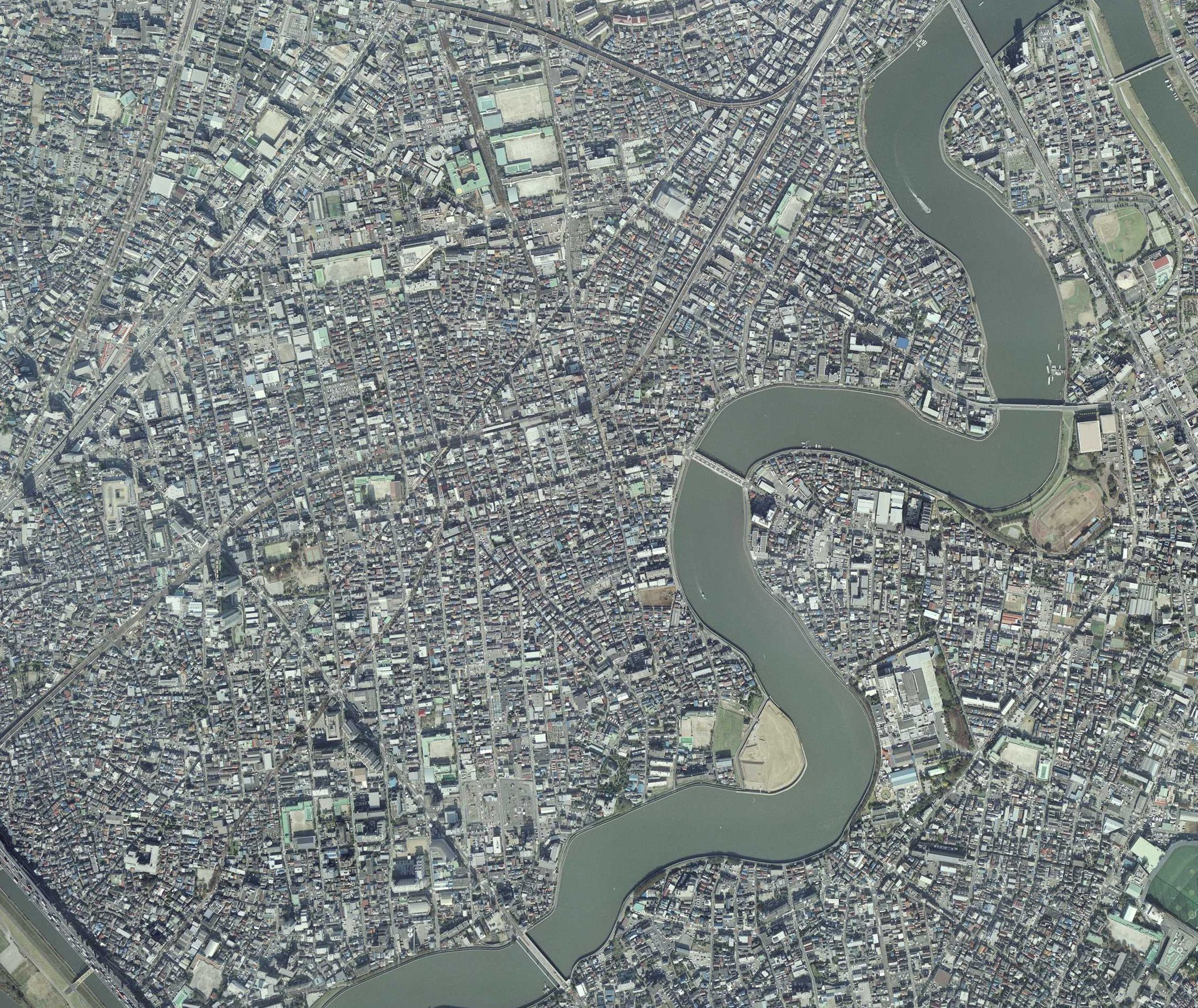 国土地理院 地図・空中写真閲覧サービスの写真CKT20064X-C4-8 を元に加工